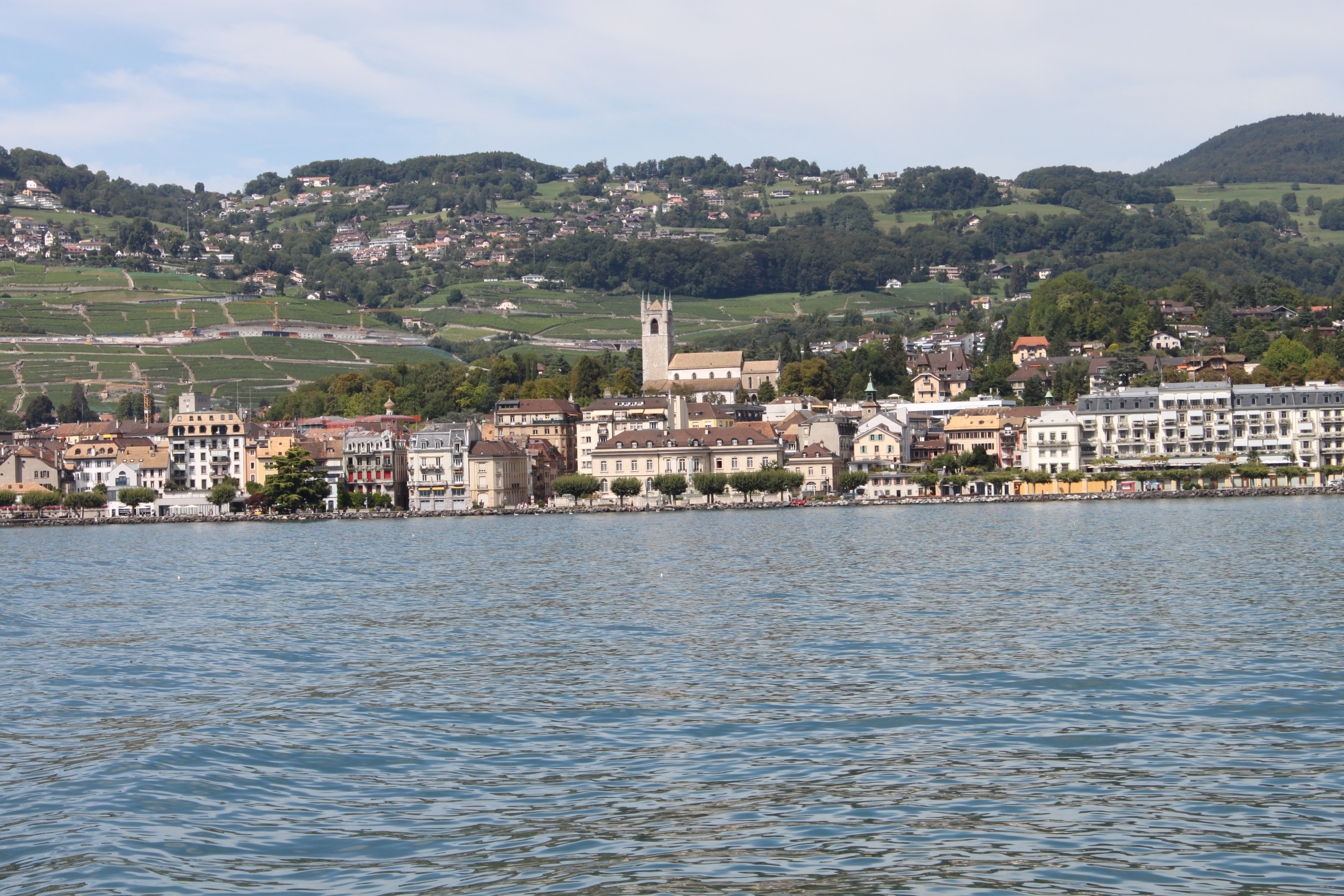 Ville de Vevey et église St-Martin. Vue depuis de le Léman